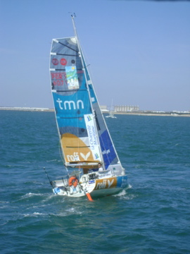 Mini 6.50 série Finot Pogo, au départ de la Transat 6.50 (2009). Skipper : Francisco Lobato